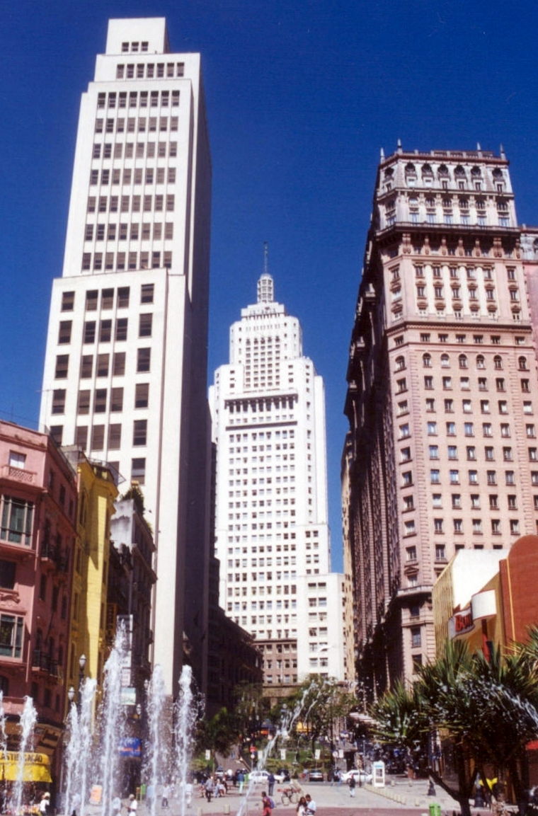 Edifício Martinelli, São Paulo, Brasil